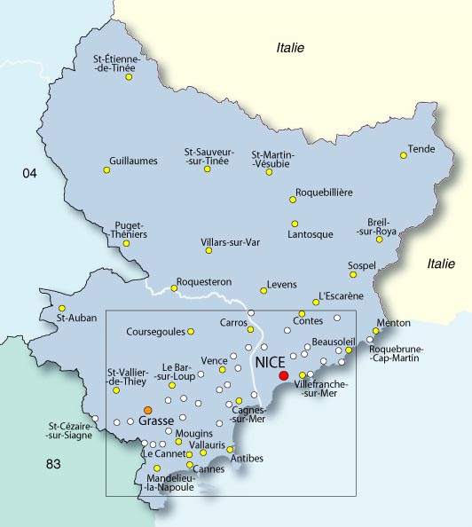 Carte des Alpes-Maritimes